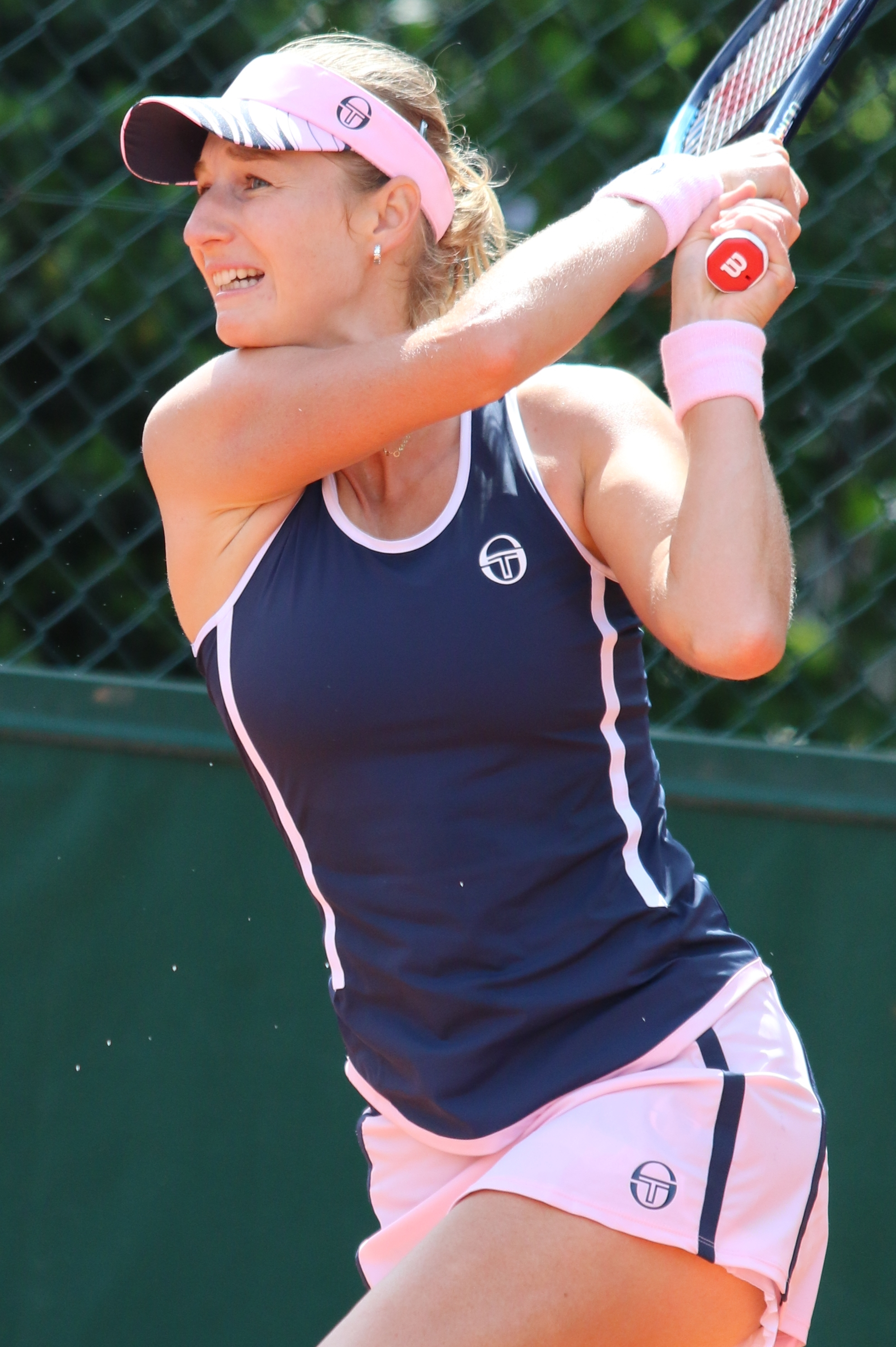 Makarova RG18 (23)